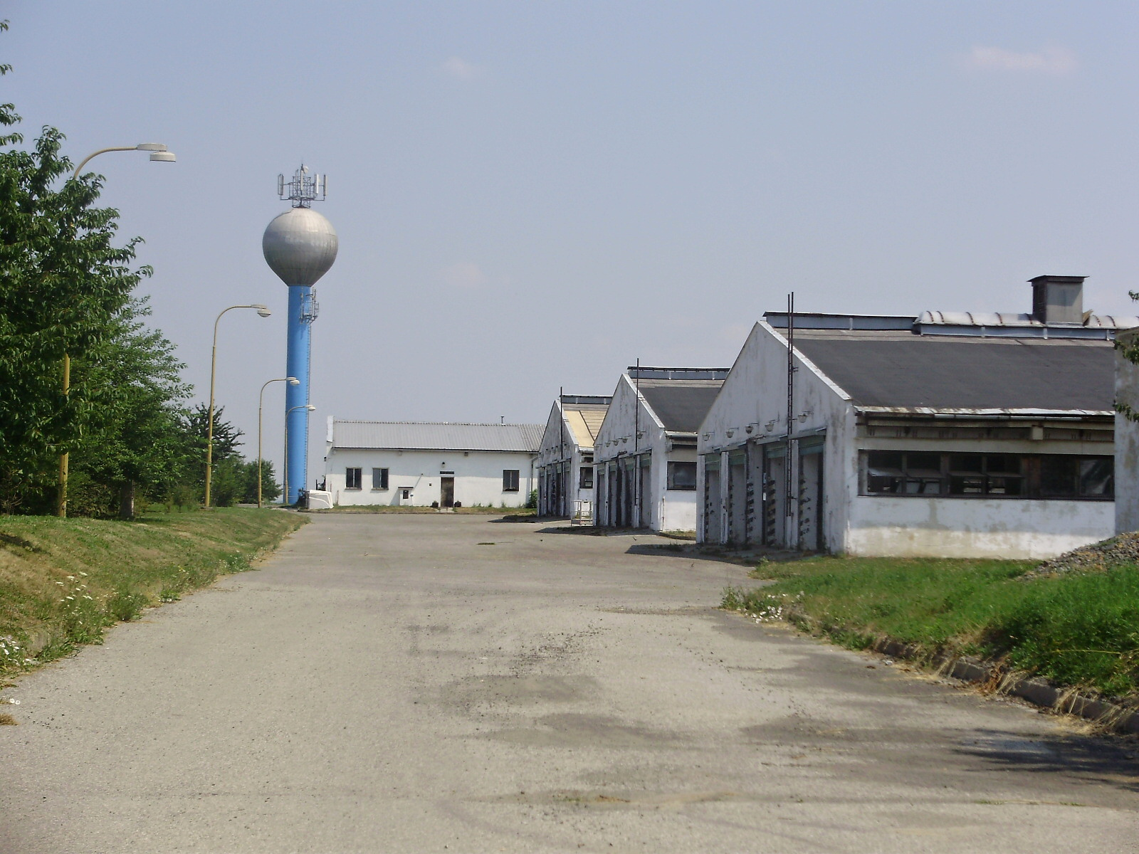 AGROSUMAK Suchdol nad Odrou